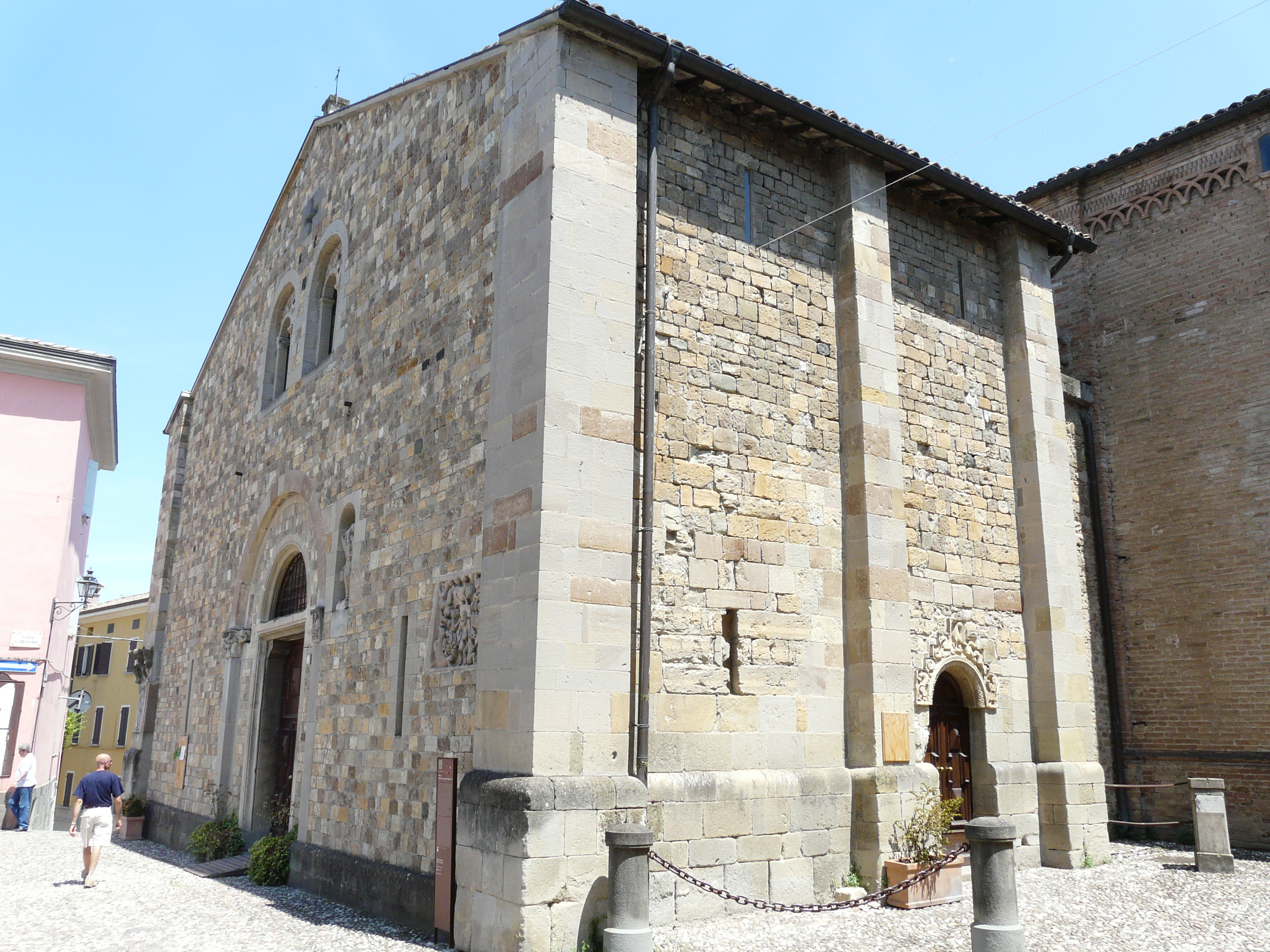 Chiesa dell'Assunzione di Maria Vergine, Fornovo di Taro, Emilia-Romagna, Italia